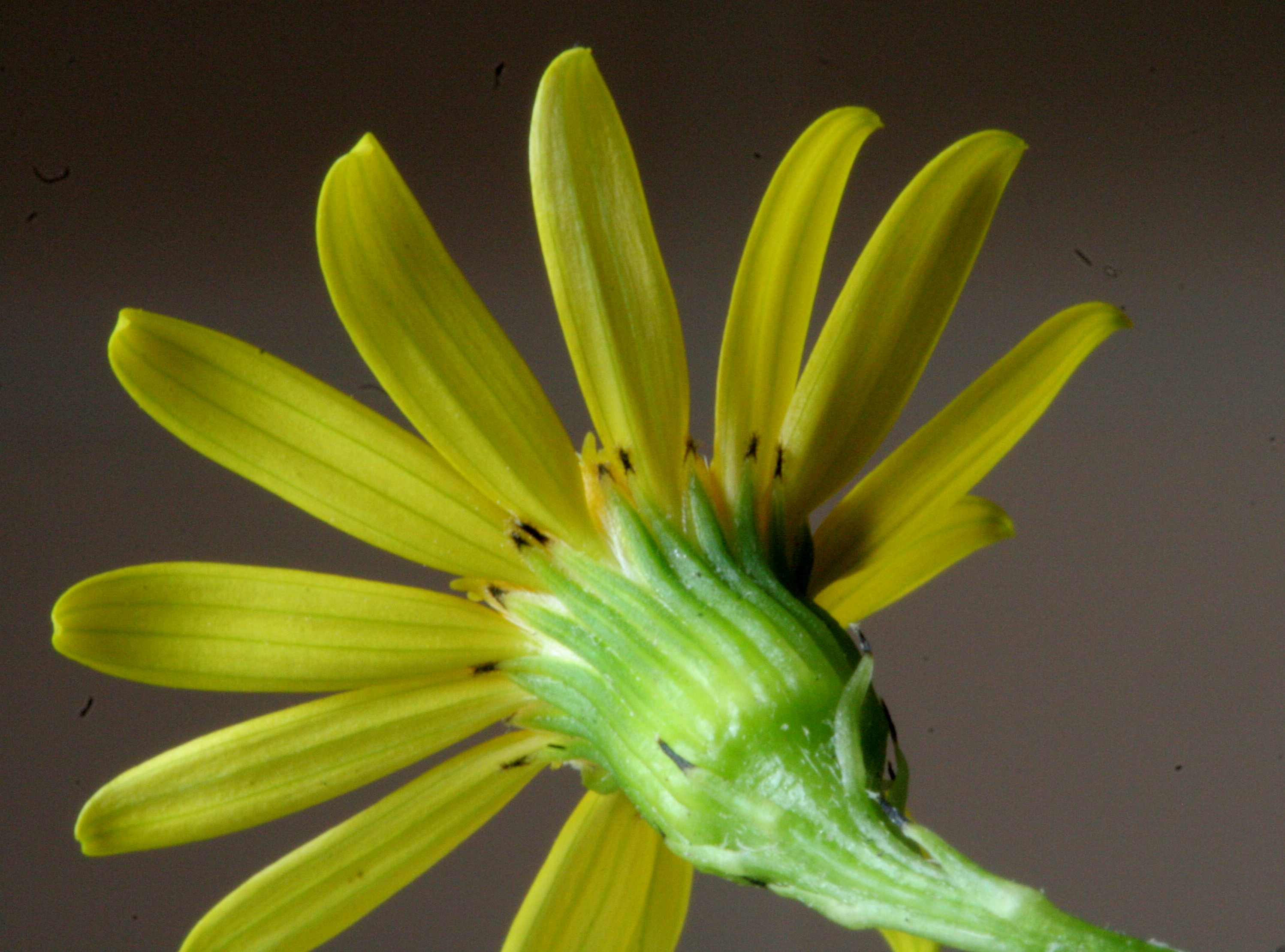 Senecio montanino - Cima Sappada, Sappada (BL), 1290 m s.l.m.